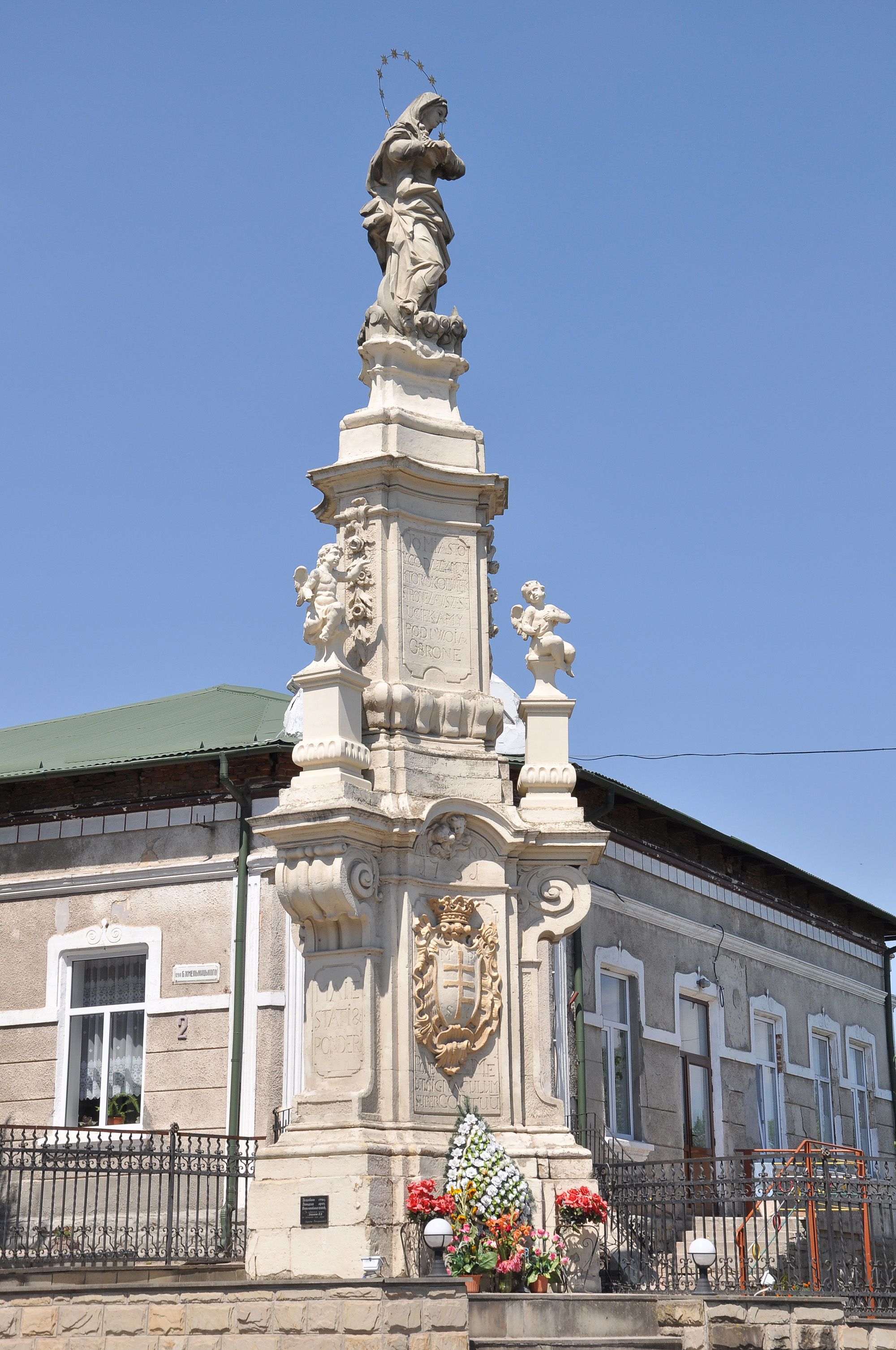 Скульптура Матері Божої в Бучачі Тернопільської області на вул. Б. Хмельницького, 2, біля дитячого садочка «Сонечко» (неподалік художньої школи) (копія статуї — робота Романа Вільгушинського).